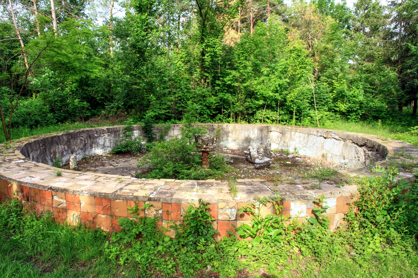 Куболтский парк, монумент природы, находится в Сынджерейский район, с. Куболта (код MD-SG-map-018)